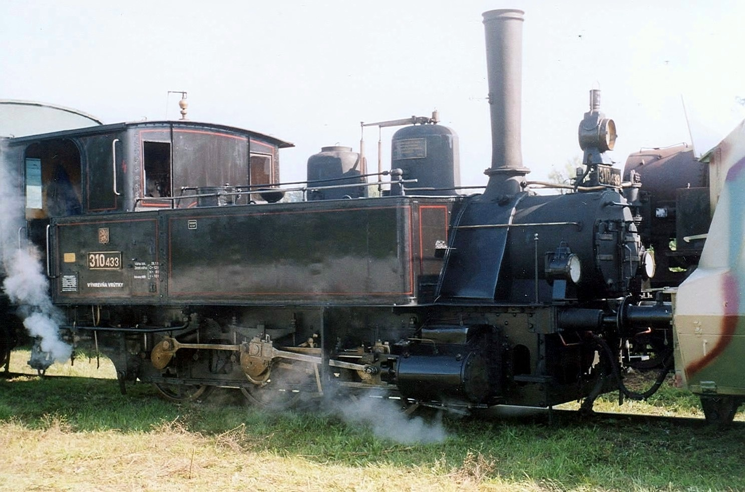 310.433 in Bratislava Vychod